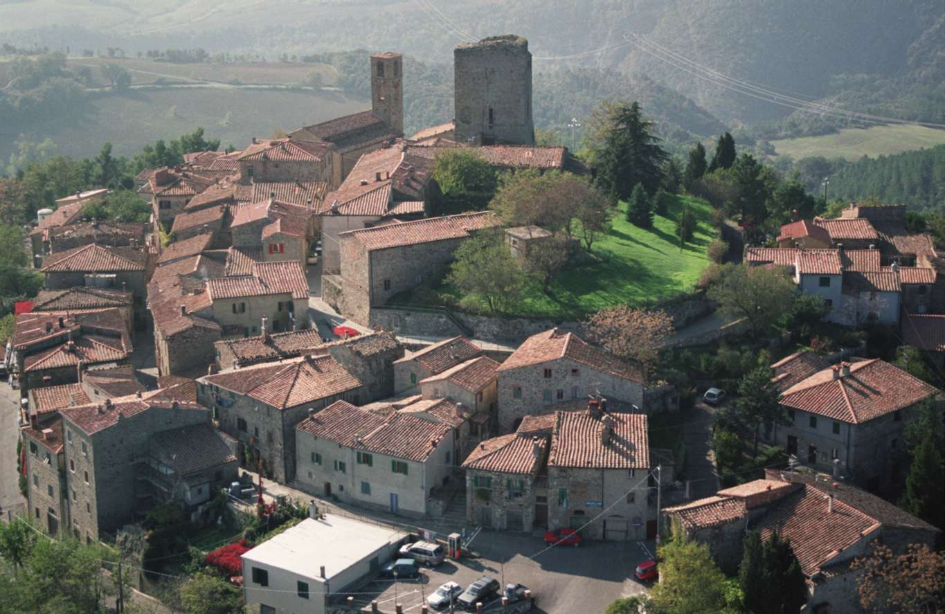 Vista del borgo medievale di Montecastelli Pisano